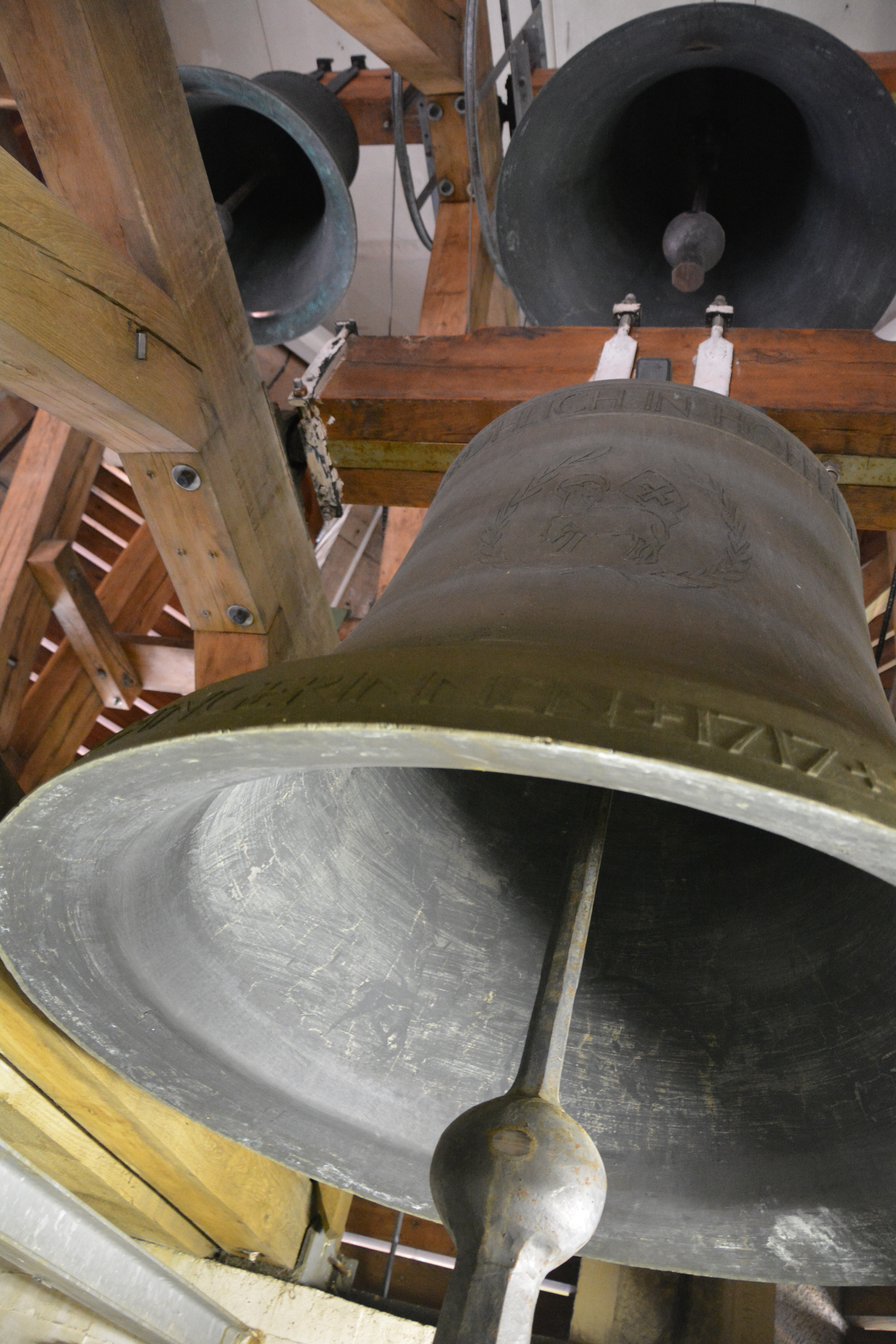 Stadtkirche "Zum Heiligen Namen Gottes" Radeberg, Bronzeglocken